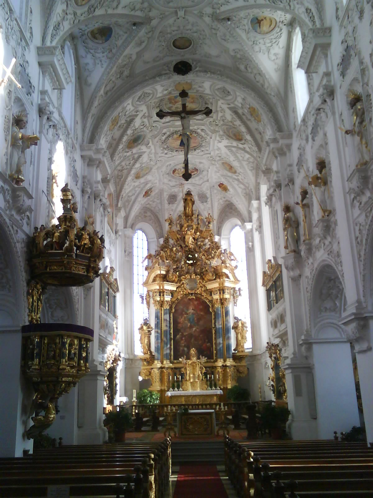 Bayern Schwaben Kirche Kirchhaslach Barock